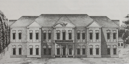 Кловський палац до надбудови.